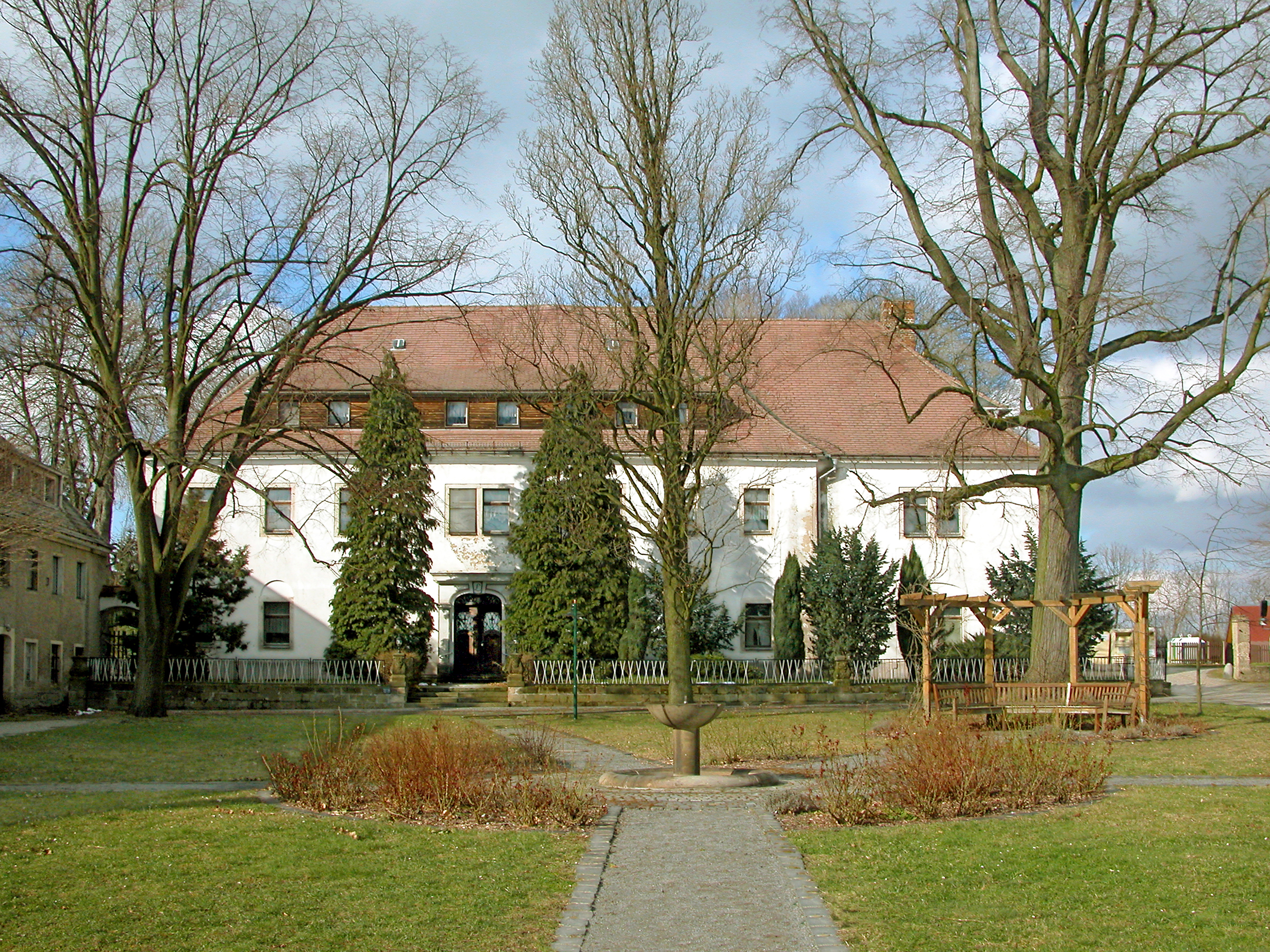 24.03.2008 01833 Heeselicht ( Stolpen), Hofestraße 1a: Herrenhaus (GMP: 51.005875,14.097121 )von 1912, Hofseite. Das Rittergut ist 1945 enteignet worden. Das Herrenhaus diente bis 2001 als Altersheim, derzeit steht es leer. [DSCN32048.JPG]20080324120DR.JPG(c)Blobelt